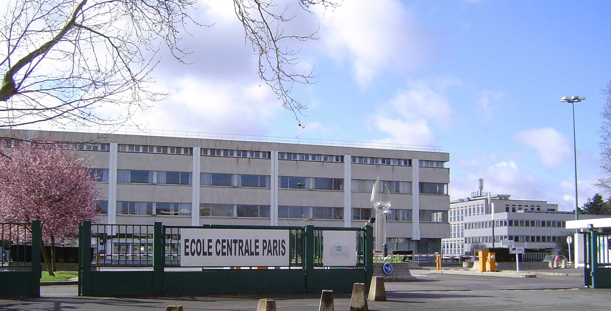 Ecole centrale